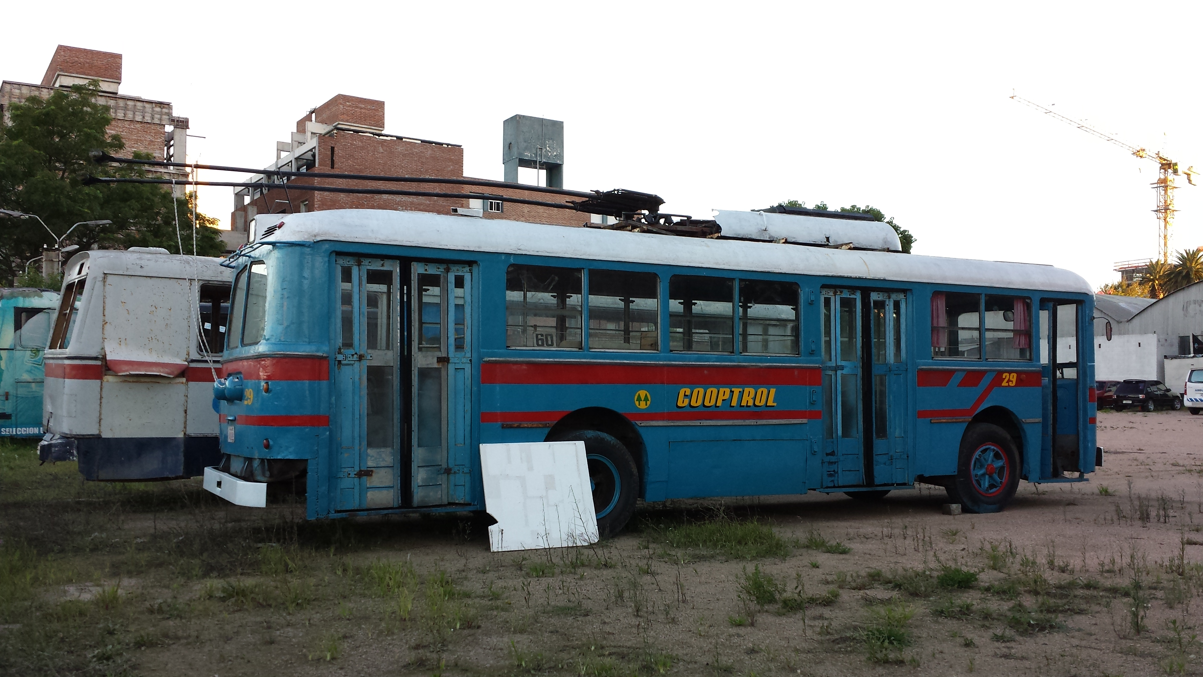 Trolebús Ansaldo San Giorgio que perteneció a COOPTROL, restaurado y preservado como coche histórico.